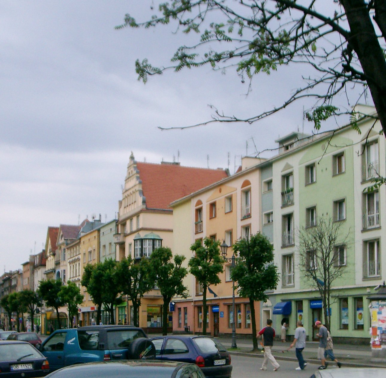 Brzeg